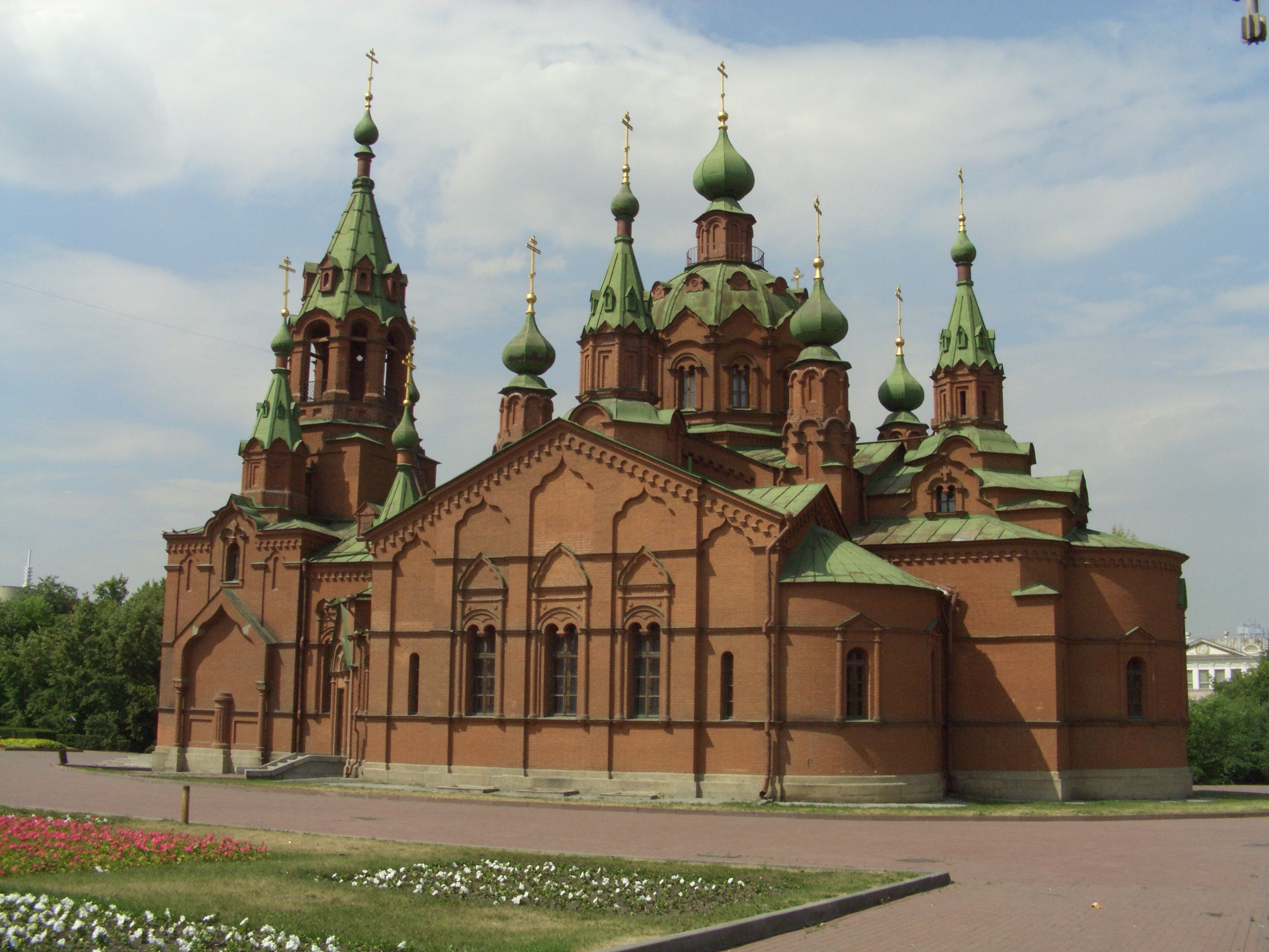 Tsentralnyy rayon, Chelyabinsk, Chelyabinskaya oblast', Russia